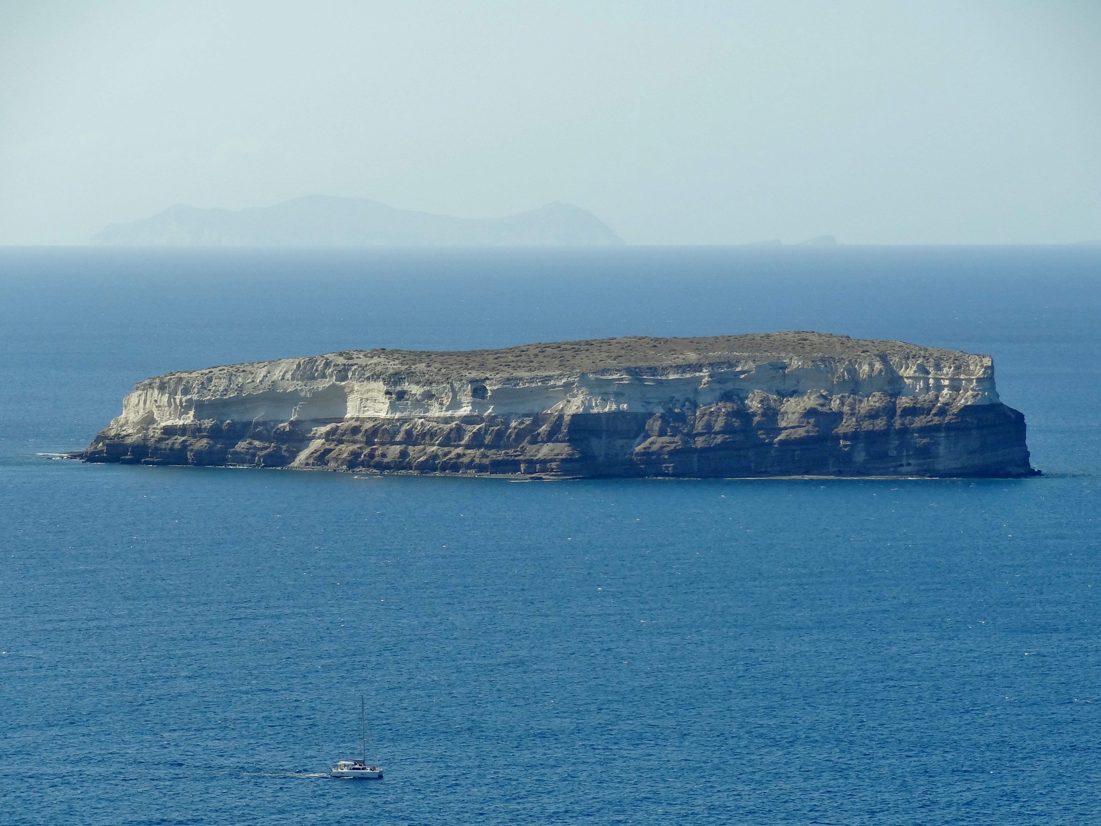 Südseite der Insel Aspro (Aspronisi) am Rand der Caldera von Santorin, Kykladen, Griechenland